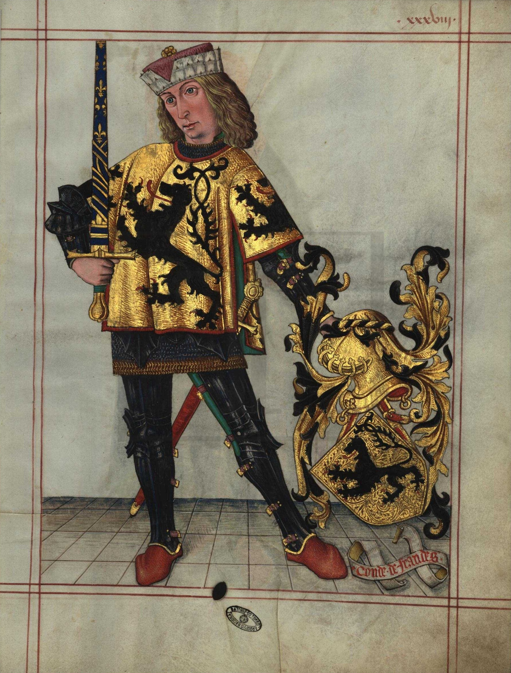 Livro do Armeiro-Mor, Conde da Flandres (fl 38)